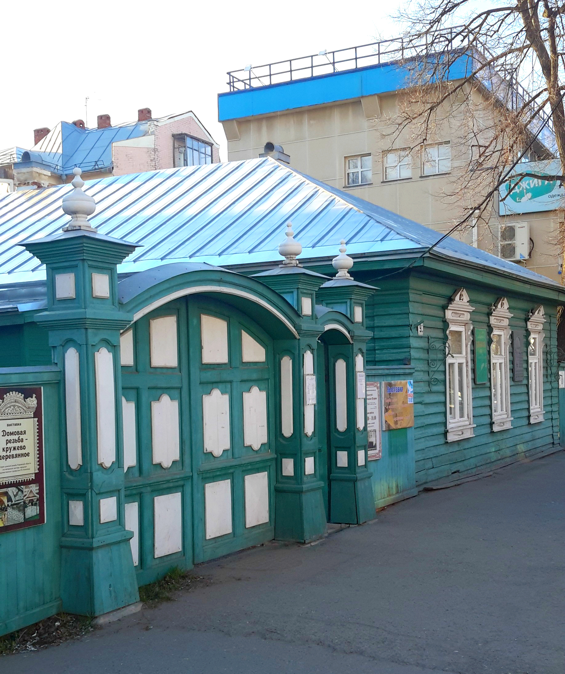 Дом, в котором в 1848-1855 гг. жил Салтыков-Щедрин Михаил Евграфович: улица Ленина, 93, Киров, Кировская область